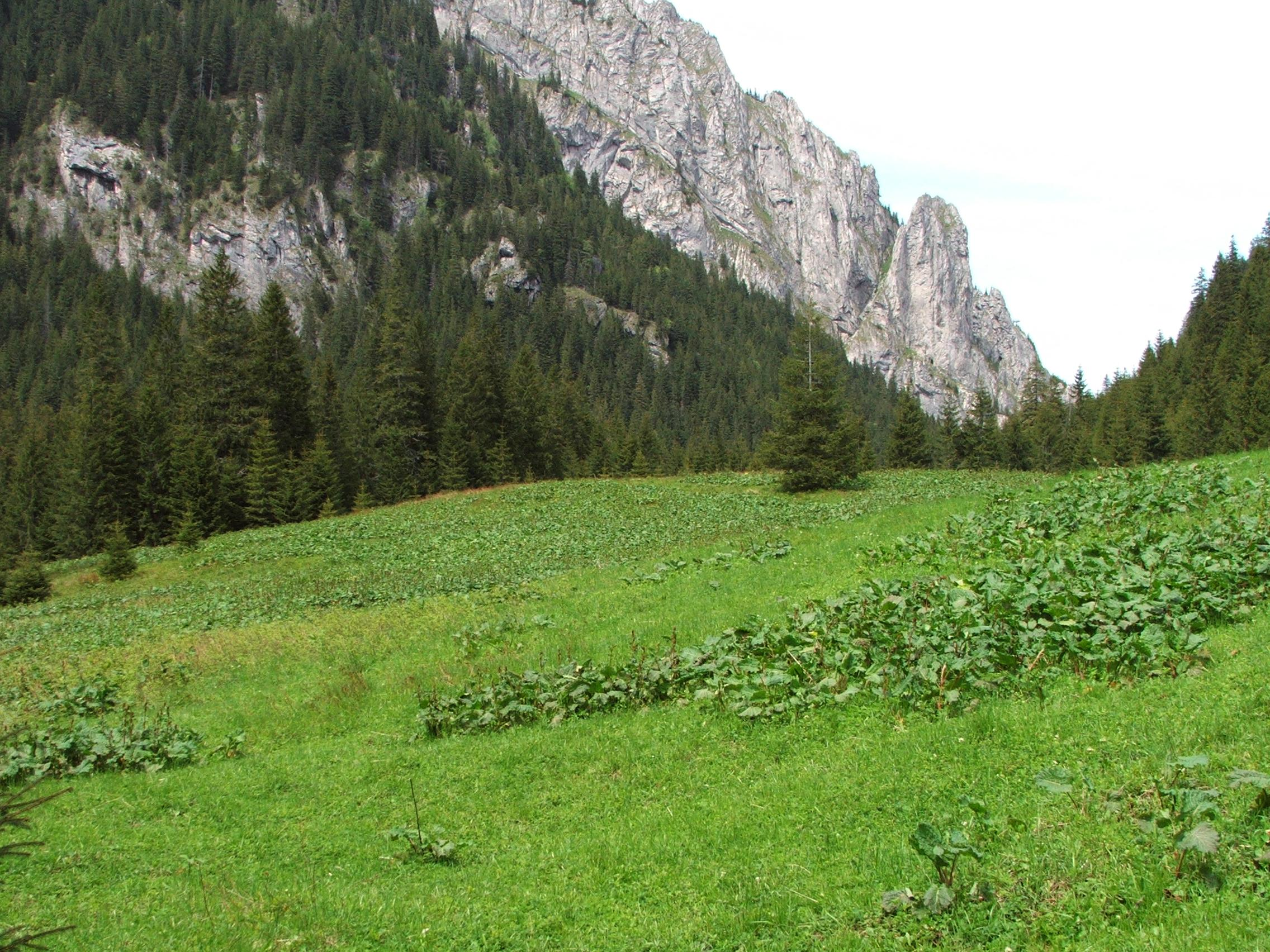 Smytnia Polana, Raptawicka Grań (West Tatra Mountains)